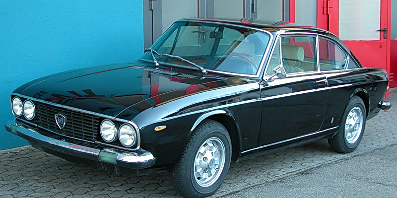 Lancia 2000 HF Coupe